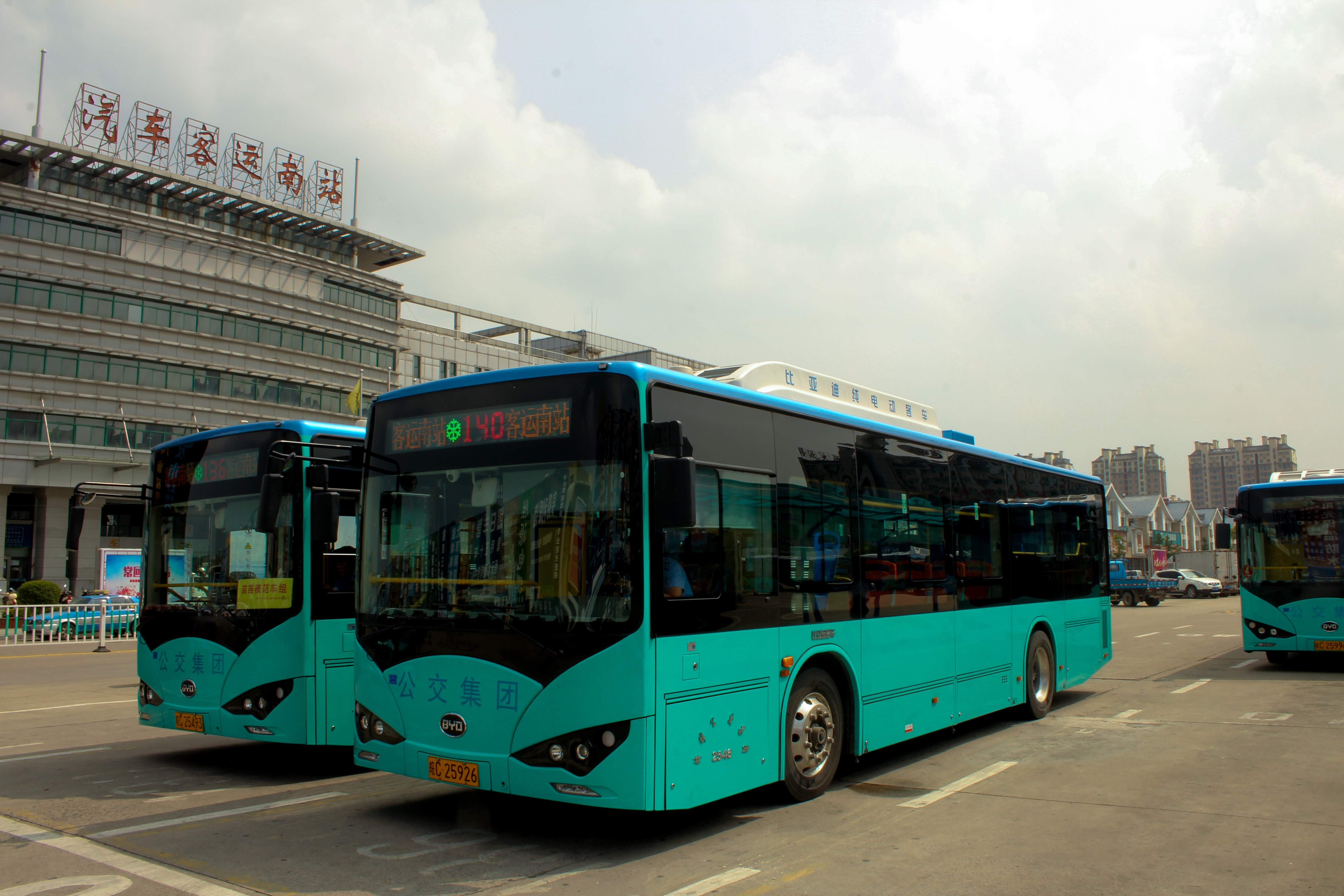 中文（中国大陆）: Bengbu Bus No. 136&140 2